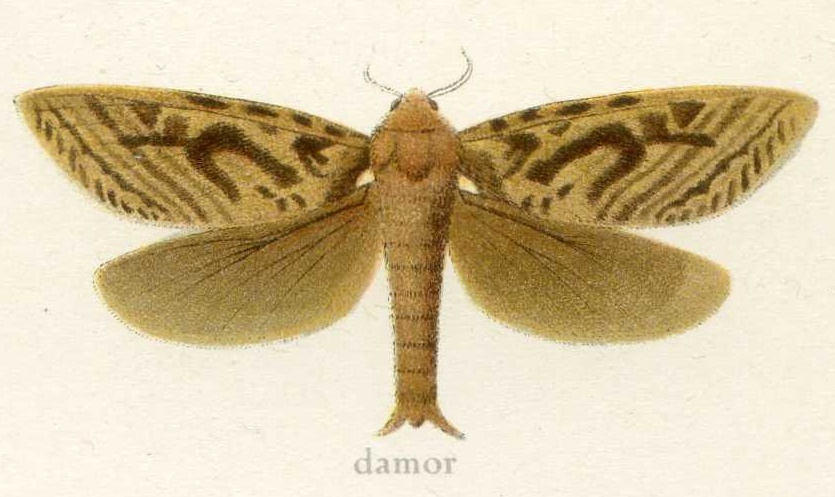 From File:HepialidaeSeitz.jpg